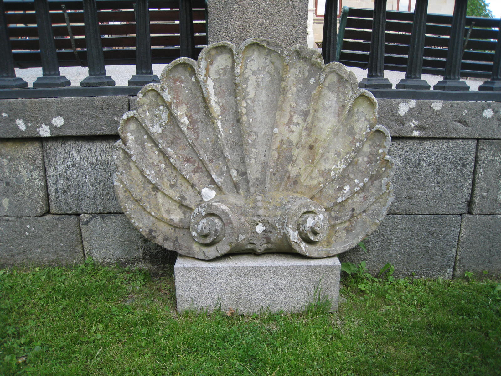 Görvälns slott i Järfälla kommun, Stockholms län.